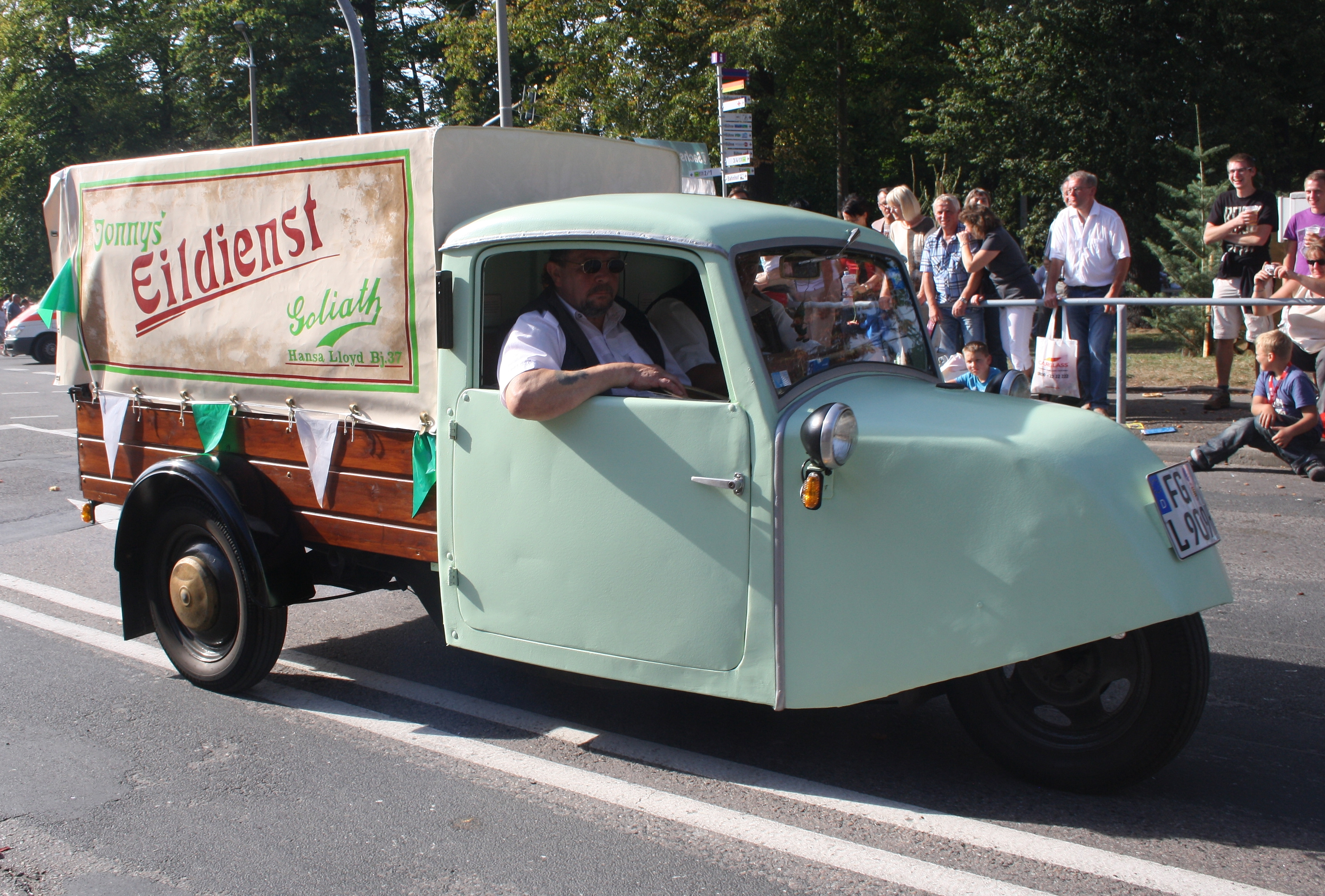 Eildienstfahrzeug aus der Vergangenheit. Freiberg 2012. Erzgebirgskreis.Sachsen.